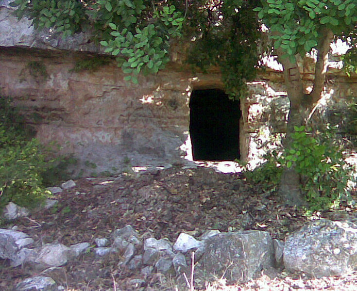 مدخل ناغوص النهر في مشتى عازار